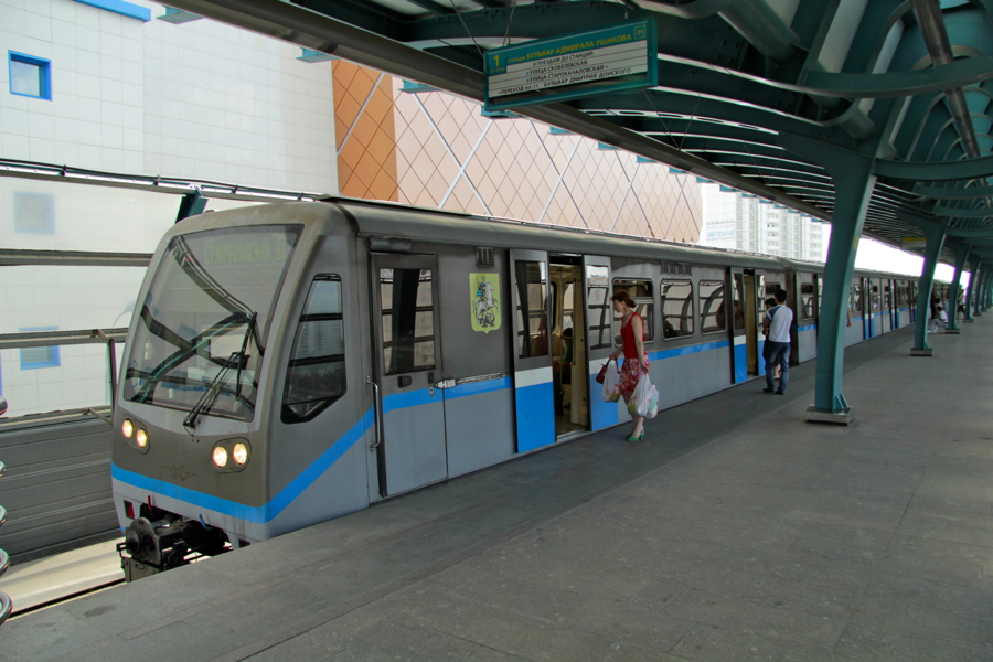 Moscow Metro (Московский метрополитен) Butovskaya Line of Light Metro (Бутовская линия лёгкого метро)